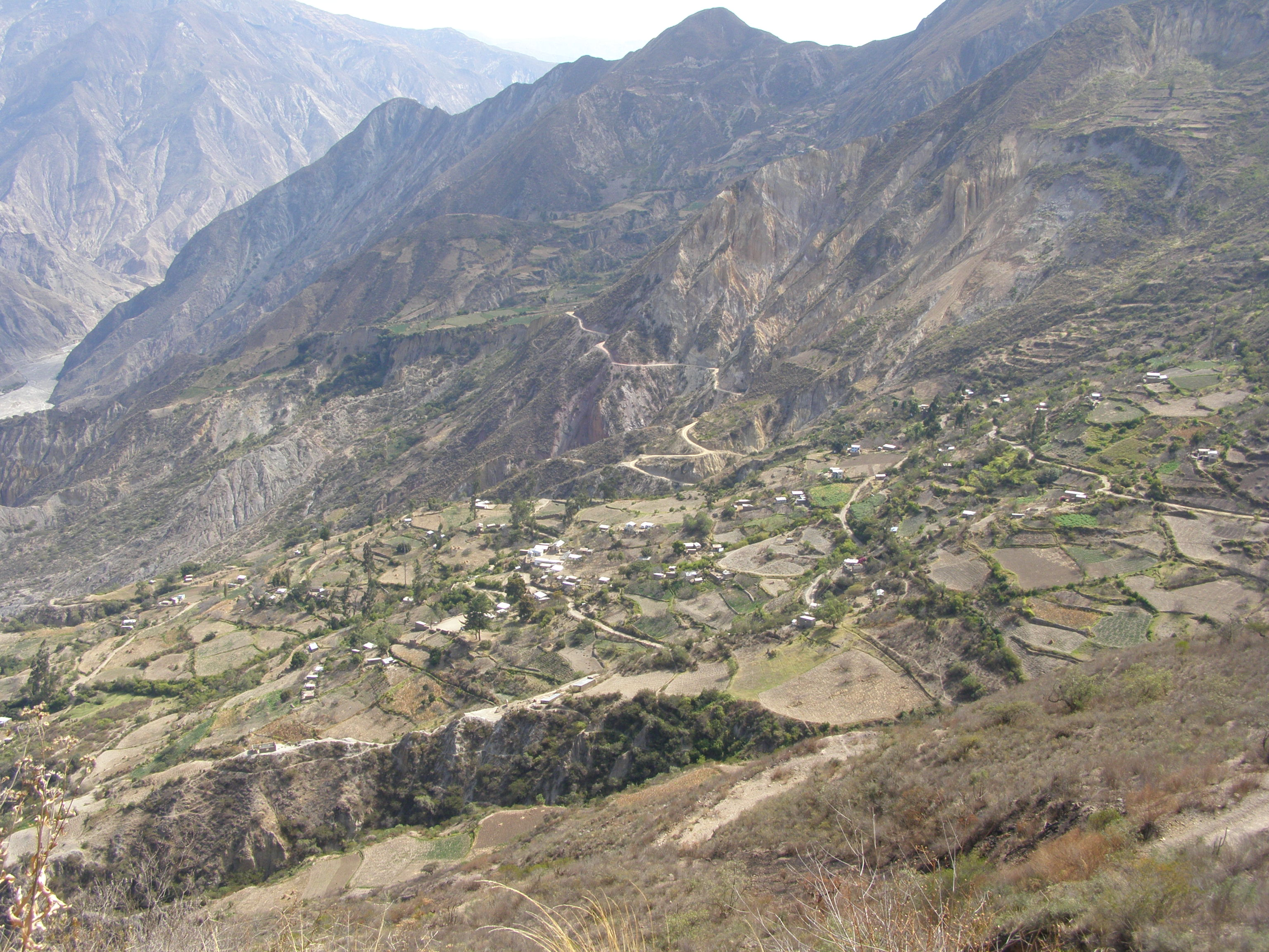 eigen werk